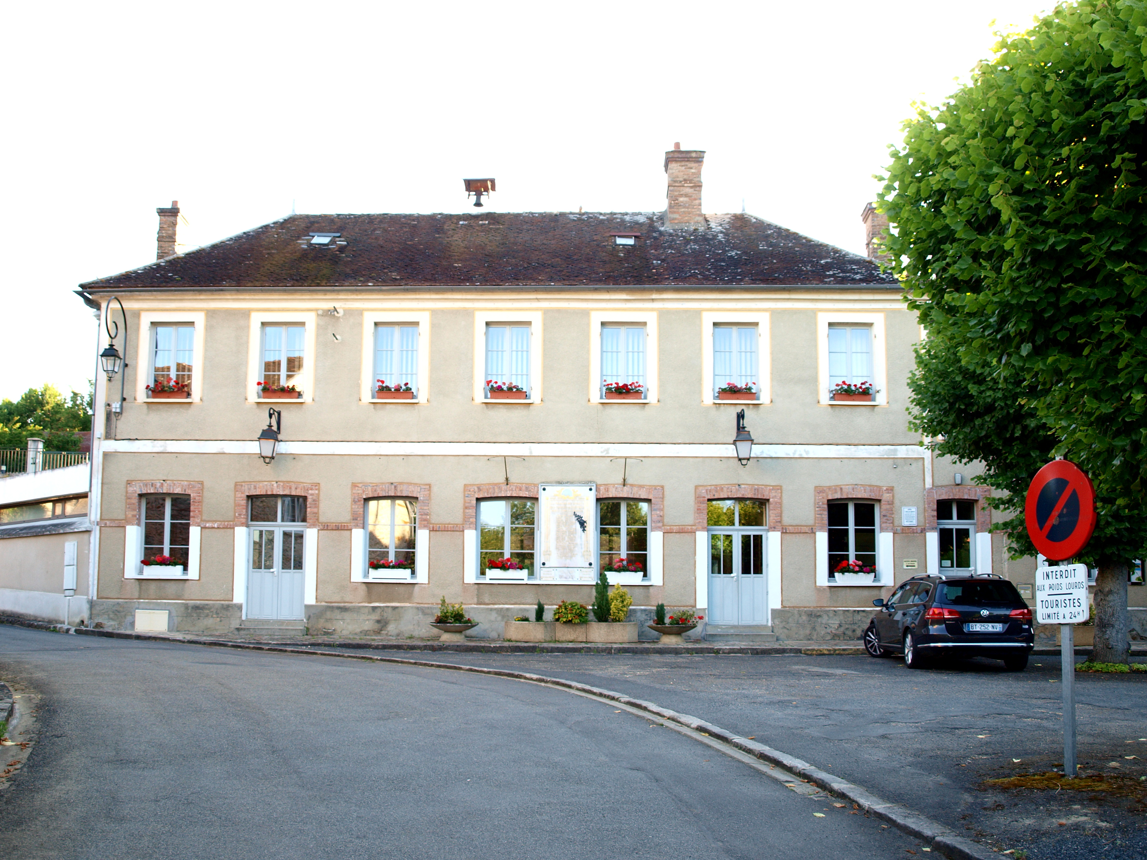 Blennes (Seine-et-Marne, France)